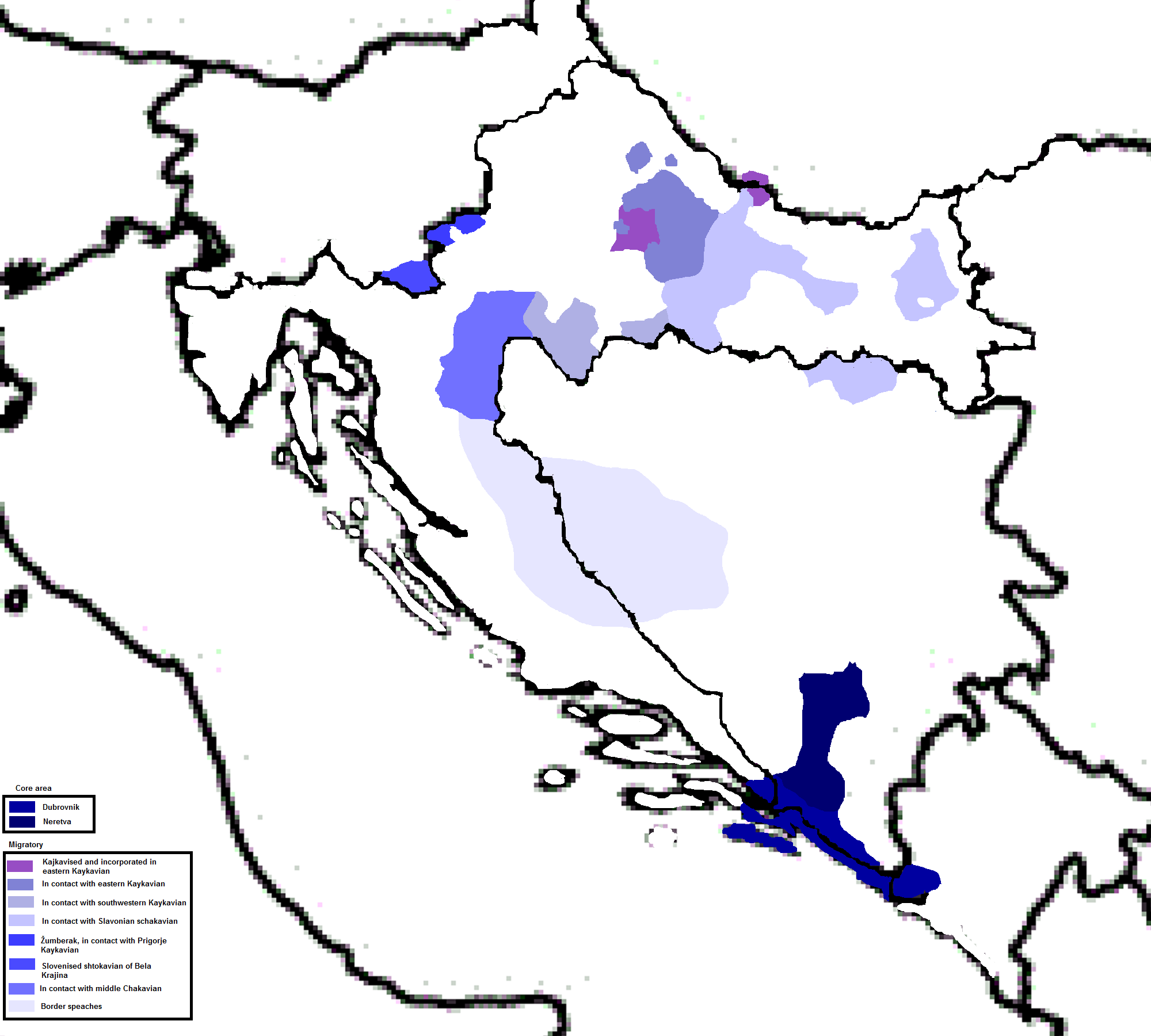 Migracije novoštokavske jekavice i područja kontakata s lokalnim dijalektima